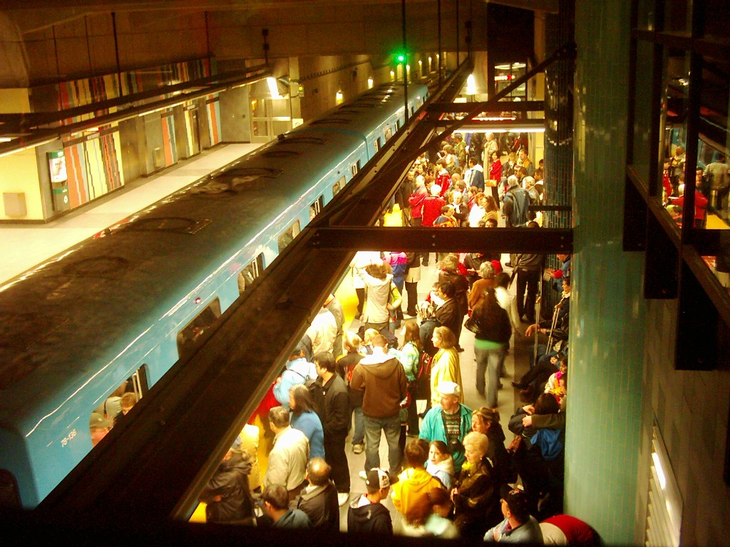 Le métro étant gratuit ce jour-là, il y avait beaucoup de monde